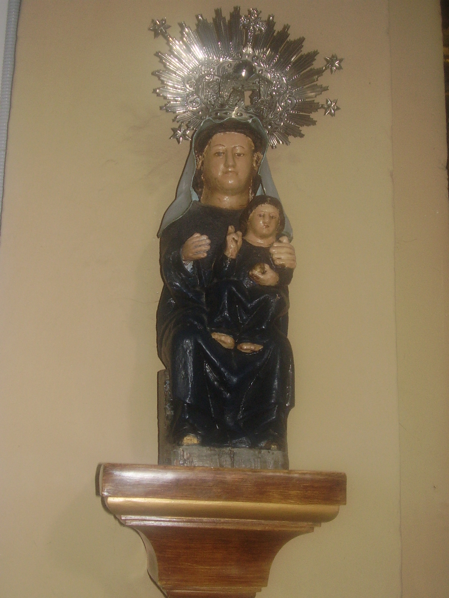 Imagen romanica de la Virgen de Las Mercedes de Las Casas de Soria.